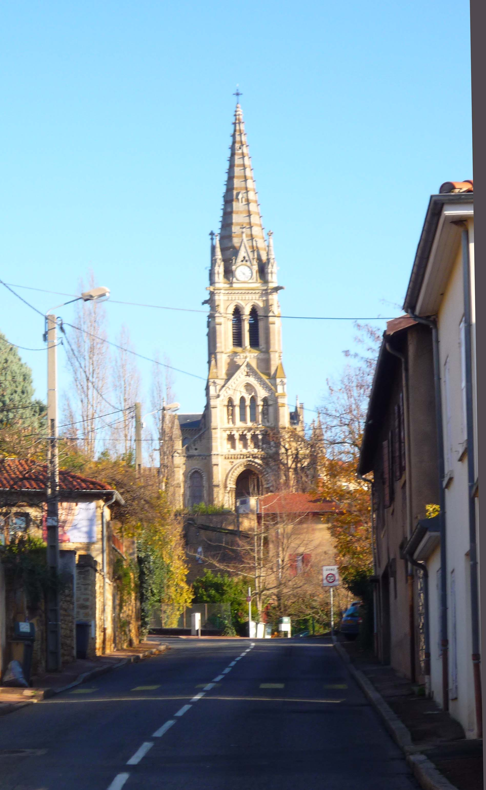 Église paroissiale de Saint-Cyr-au-Mont-d’Or, village de la banlieue nord de Lyon.